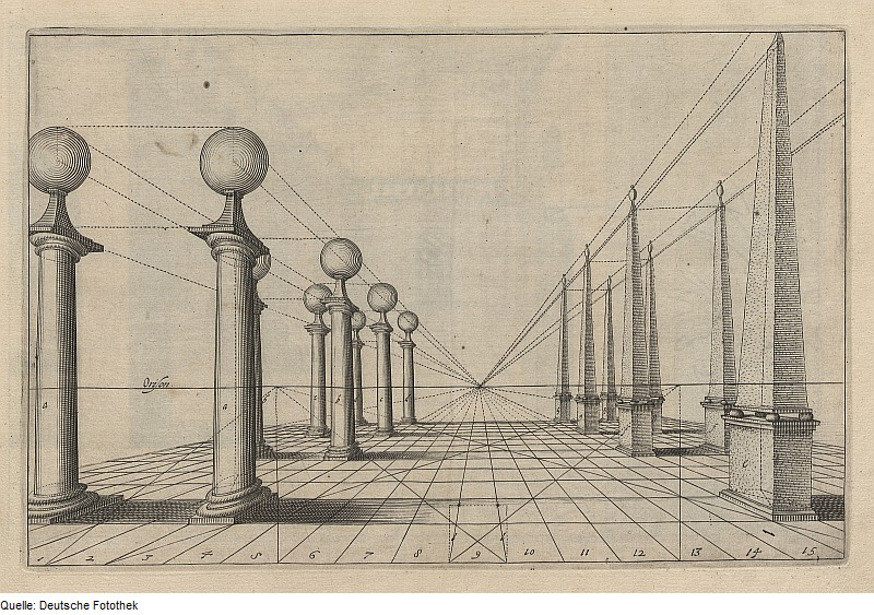 Original image description from the Deutsche Fotothek Architektur & Geometrie & Perspektive & Säule & Pyramide